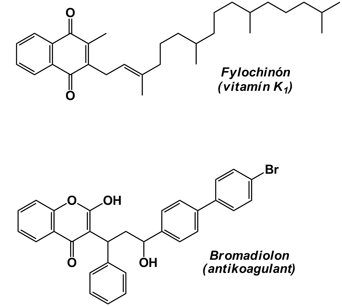 Porovnanie štruktúry vitamínu K (fylochinón, hore) a antikoagulantu (bromadiolon, dole).